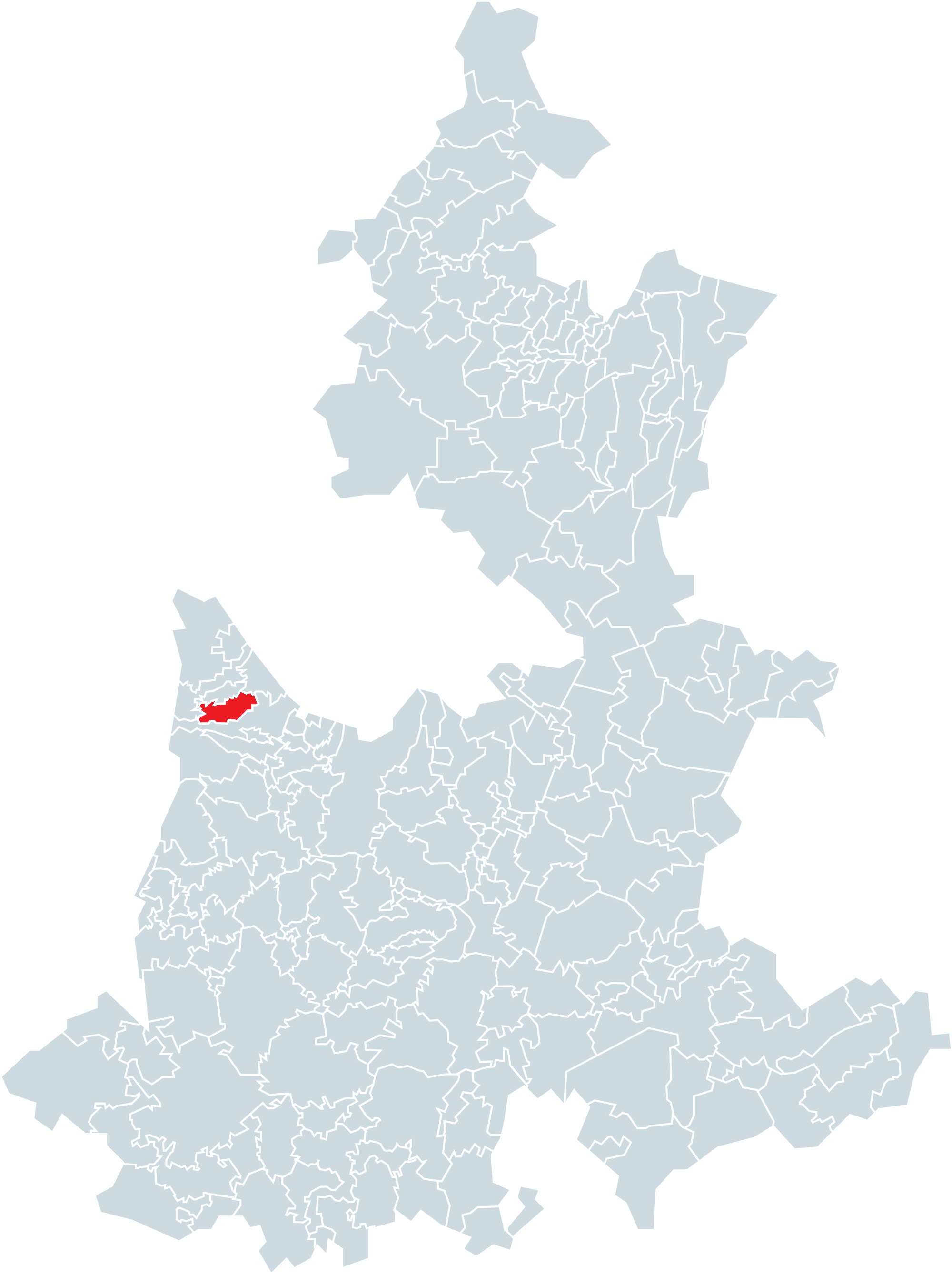 Municipio de Chiautzingo